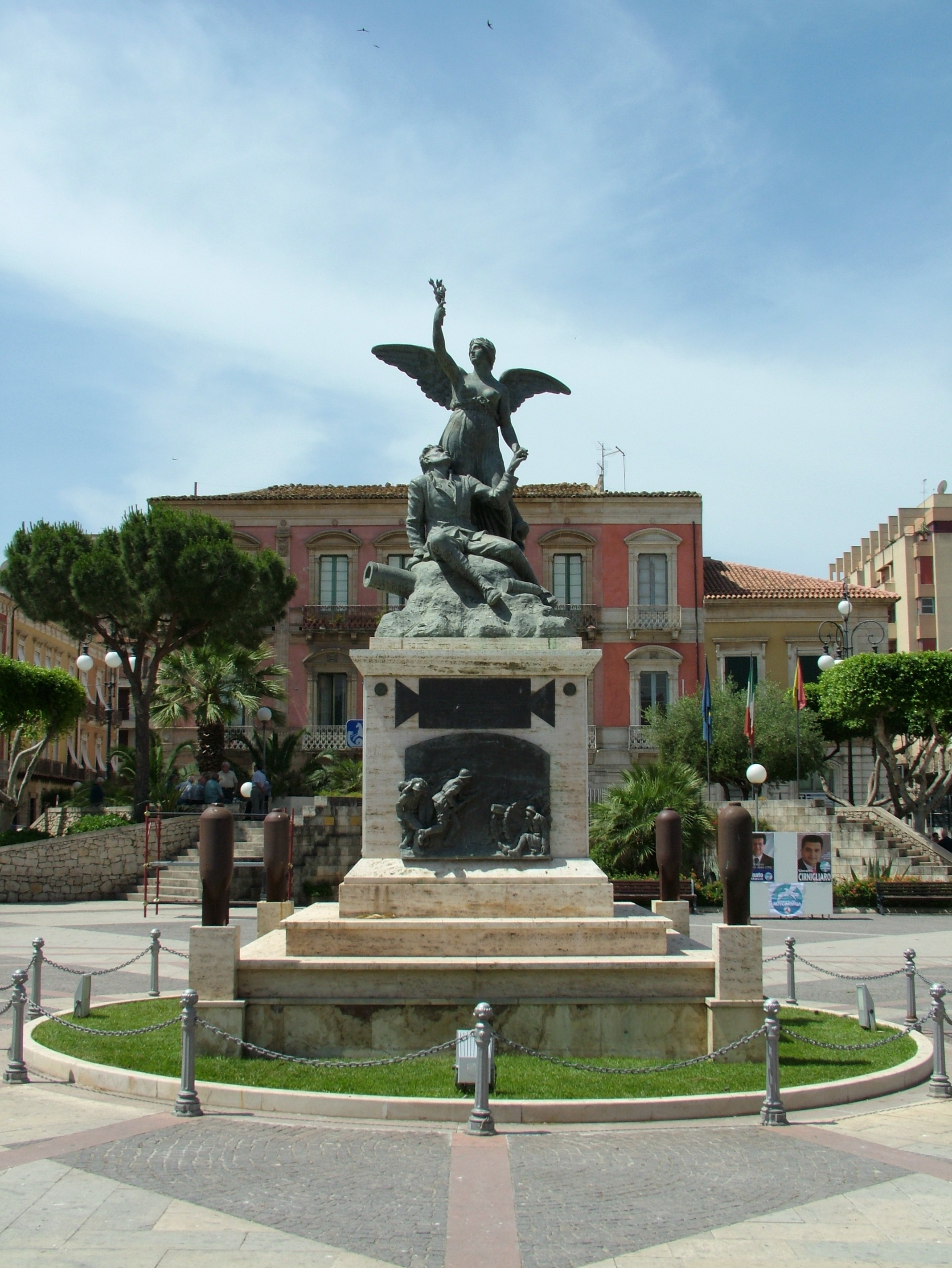 Vittoria, Sizilien, Italien, Piazza del Popoplo